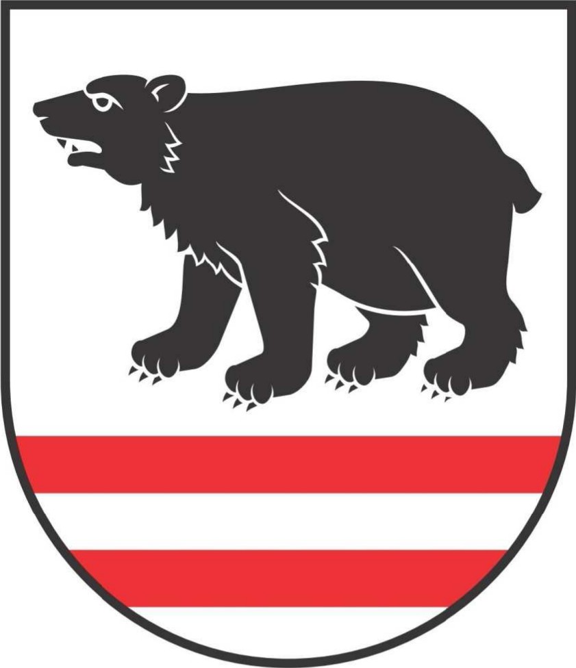 Herb gminy Kłoczew